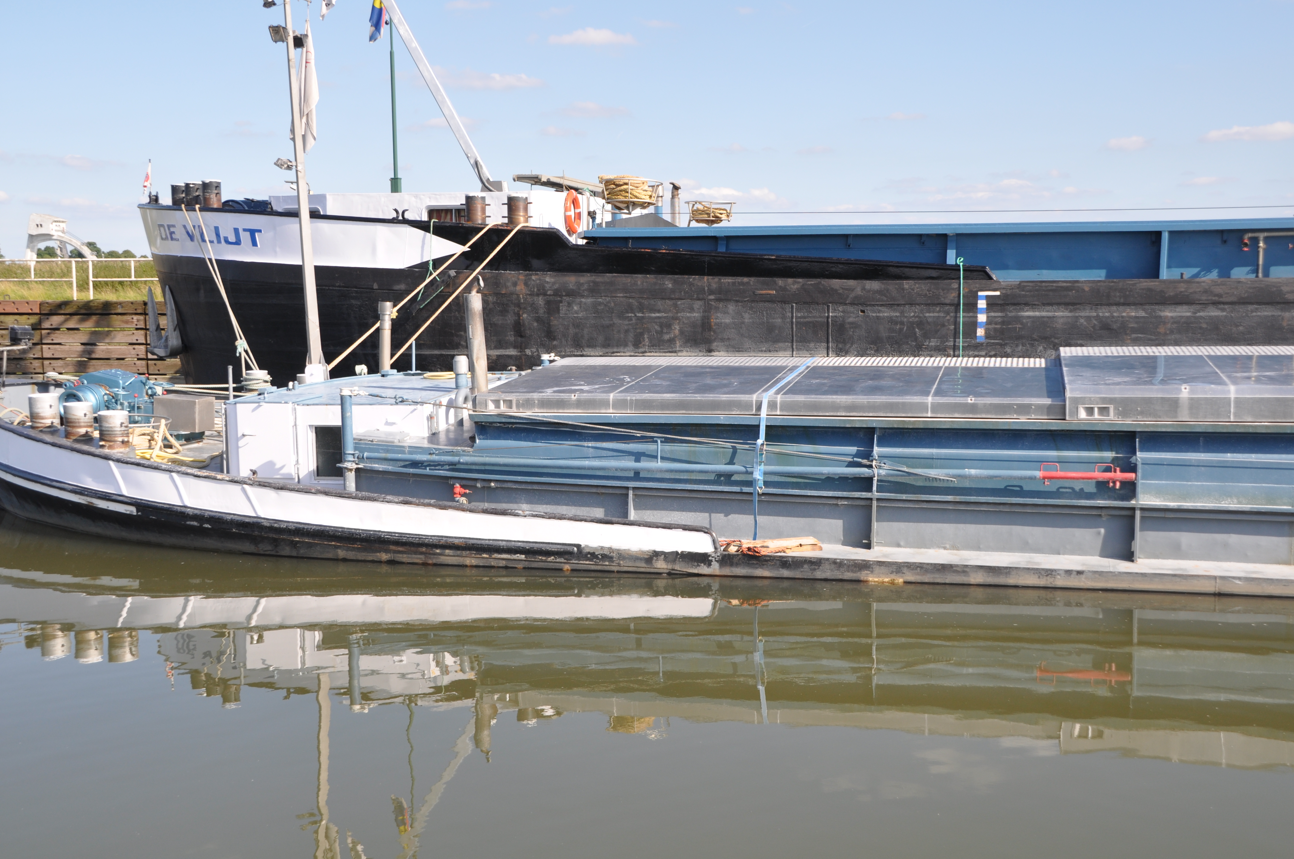 De MIRA VITA beneden sluis Driel.